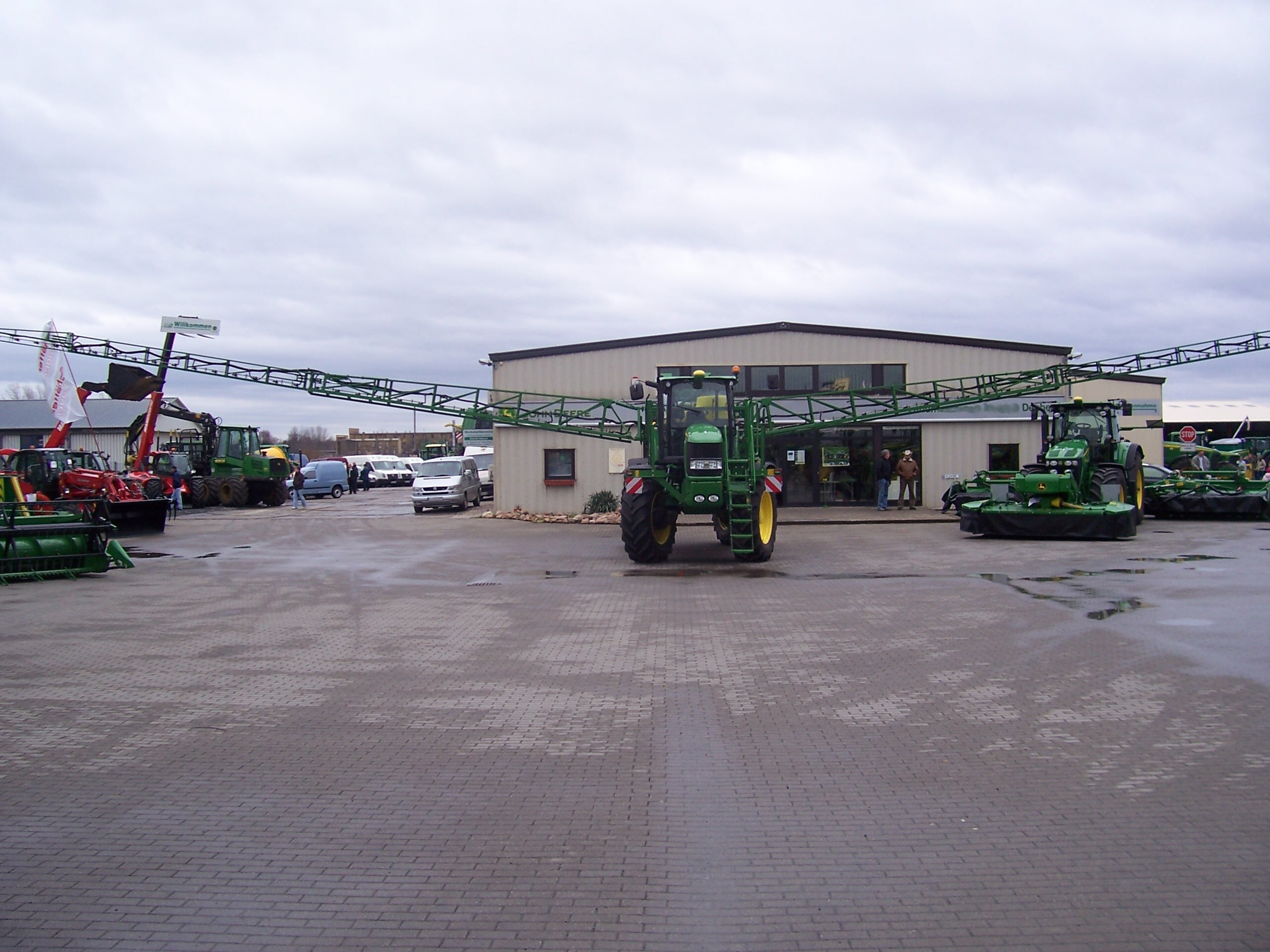 Selbstfahrende Feldspritze John Deere 5430i